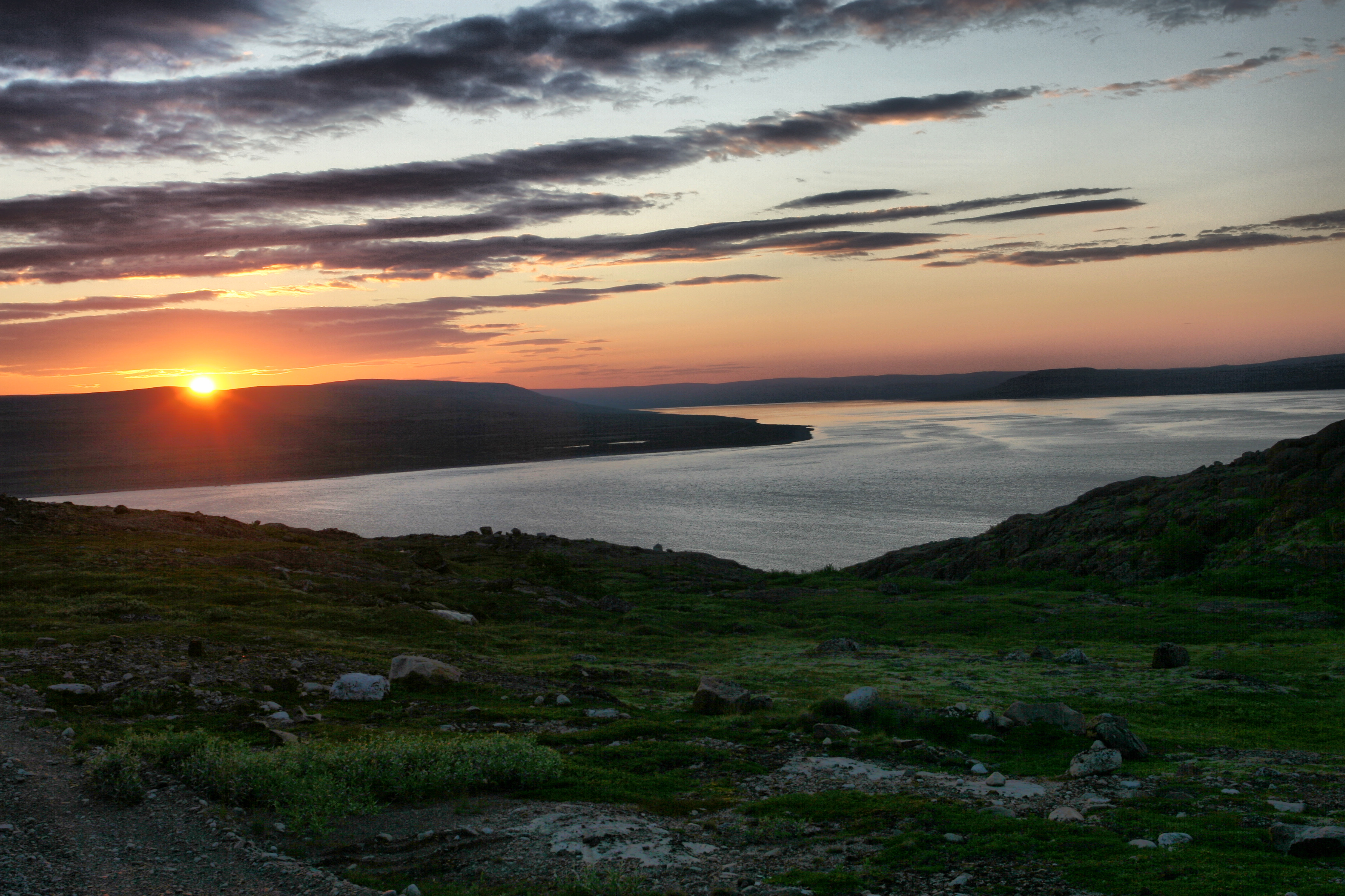 Motovský záliv